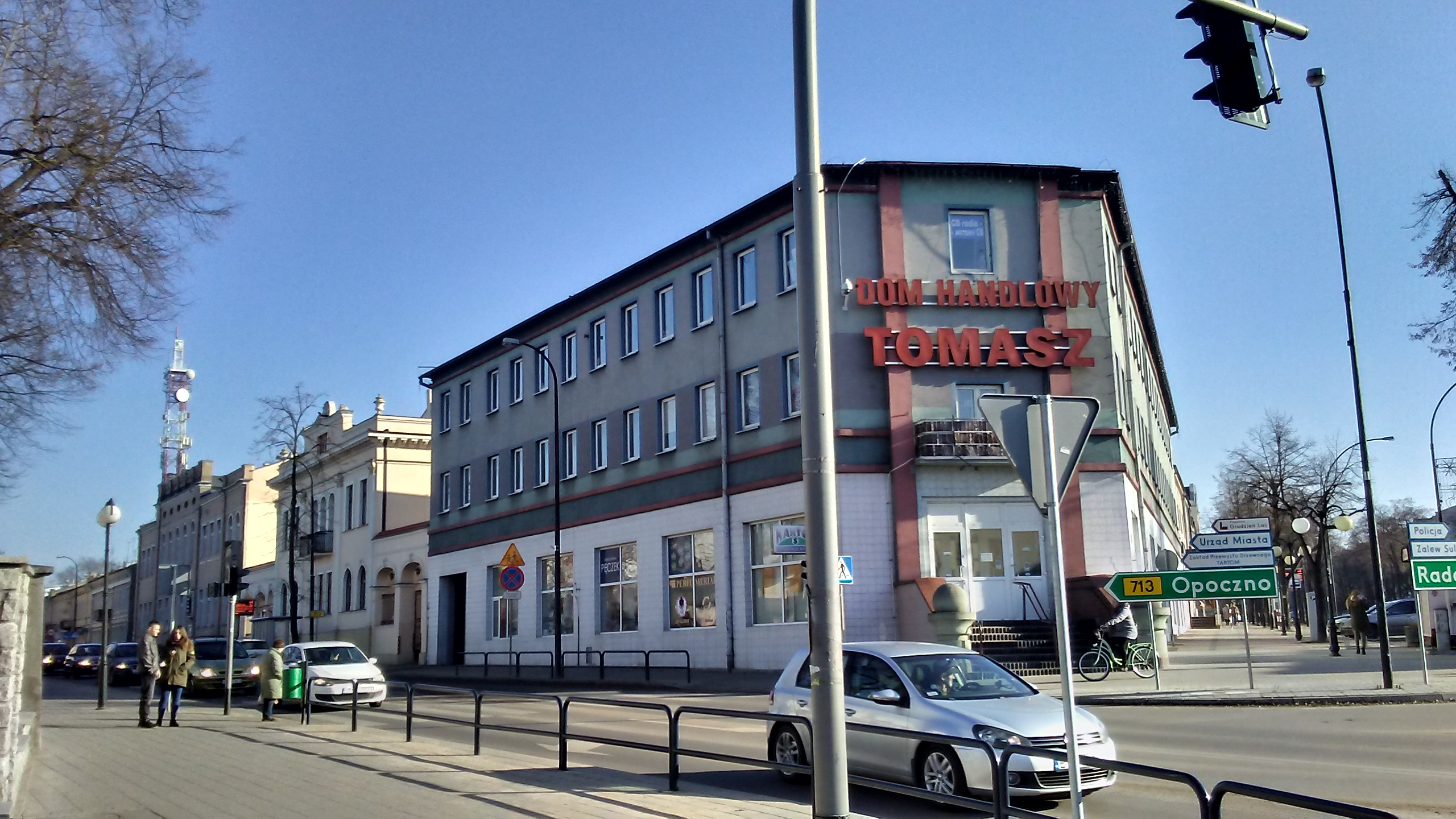 Tomaszów Mazowiecki w w województwie łódzkim, PL, EU. Najstarszy działający dom handlowy w mieście w PRL w sieci PDT, po 1989 roku Dom Handlowy Tomasz. Skrzyżowanie ulic Mościckiego i św.Antoniego. CC0